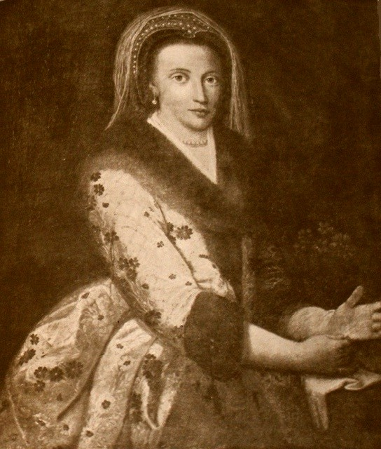 Портрет, ймовірно, Марії Могилівни (Потоцької, Фірлєй, Maria Movila)